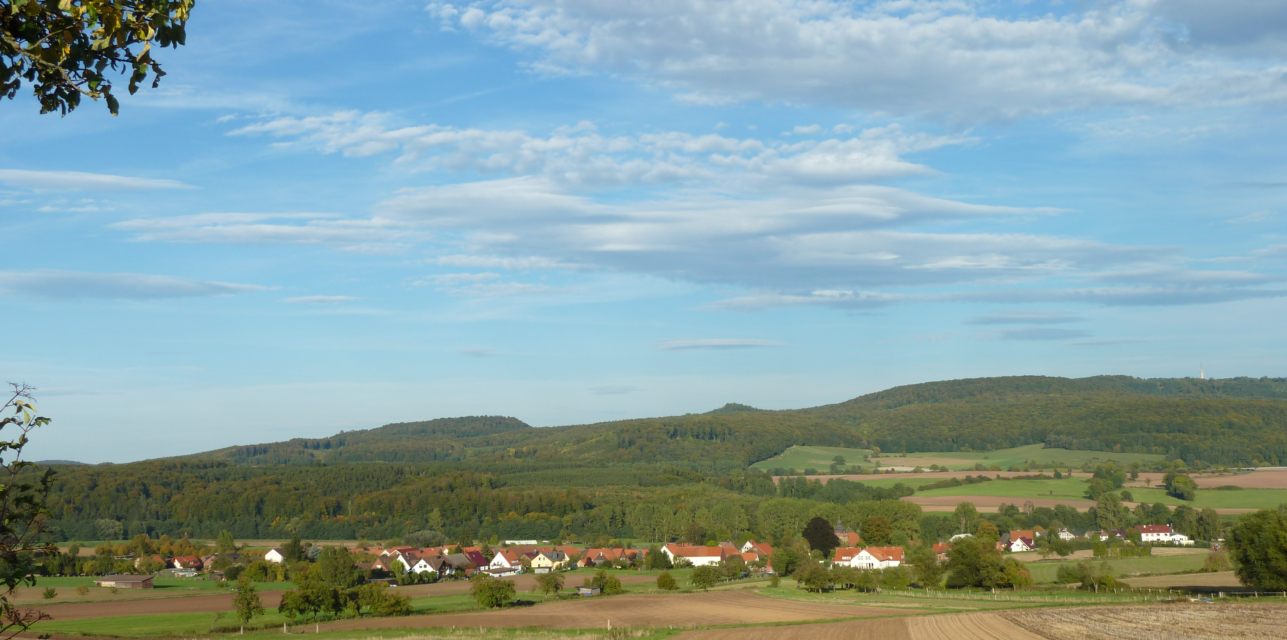 Blick von Westsüdwesten vom Osthang des Bramwalds auf Dankelshausen, Gemeinde Scheden, Niedersachsen